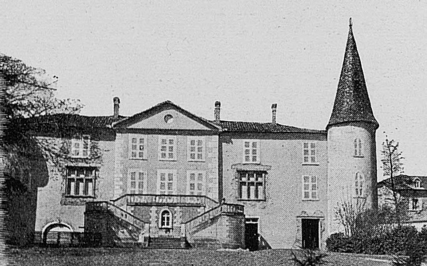 Dictionnaire illustré des communes du département du Rhône. Tome 1 / par MM. E. de Rolland et D. Clouzet.